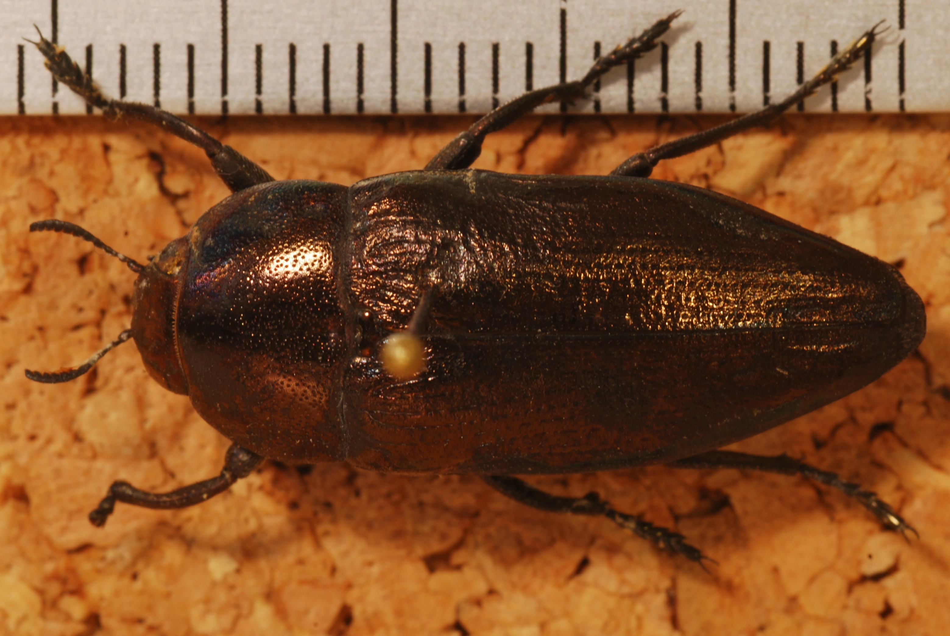 Palmyra, SYRIA